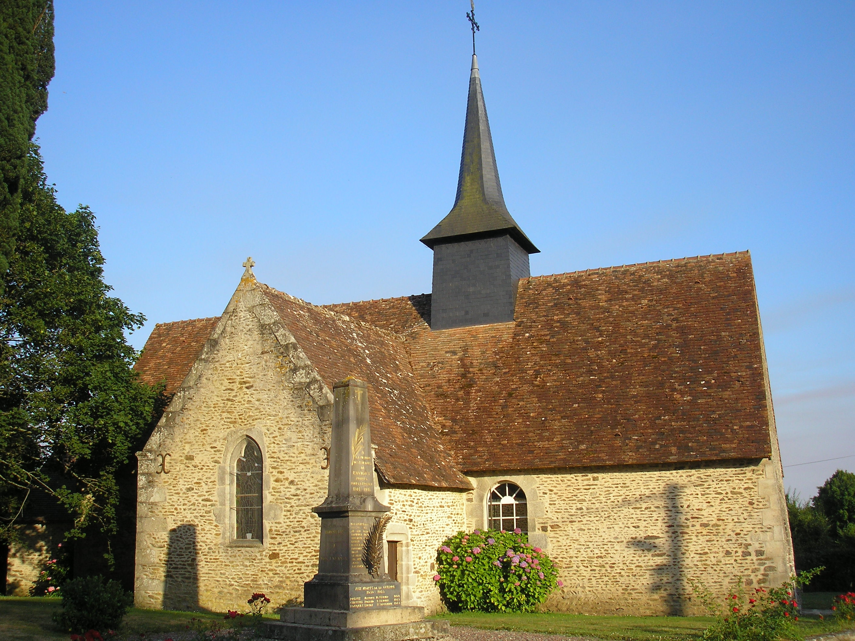 Ravigny (Pays de la Loire, France). L'église Saint-Julien.